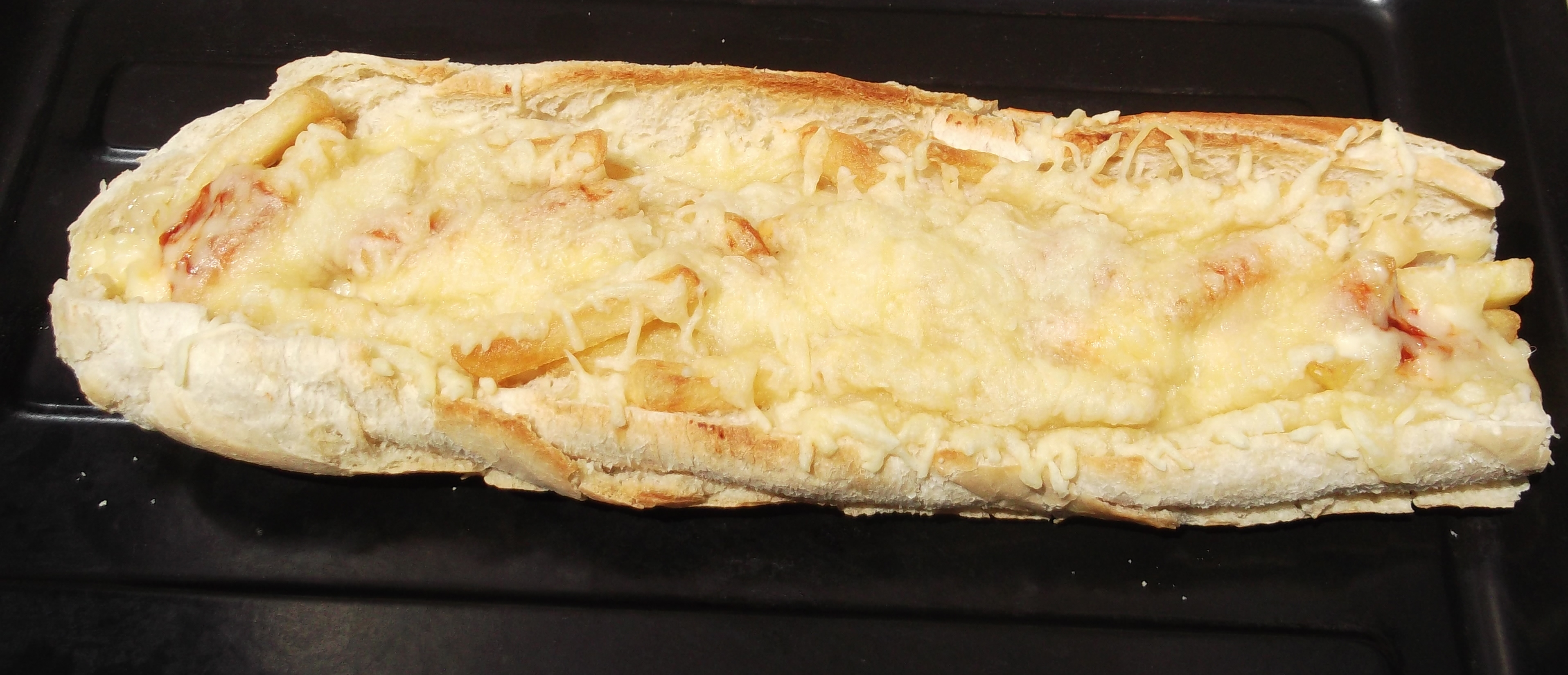 Sandwich américain réunionnais